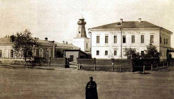 Одноэтажное здание Дамского попечительского общества (ныне административные службы ЦУМа («Зауральский торговый дом»)), двухэтажный дом Ивана Петровича Розинга (снесен в связи с расширением здания универмага) в Кургане